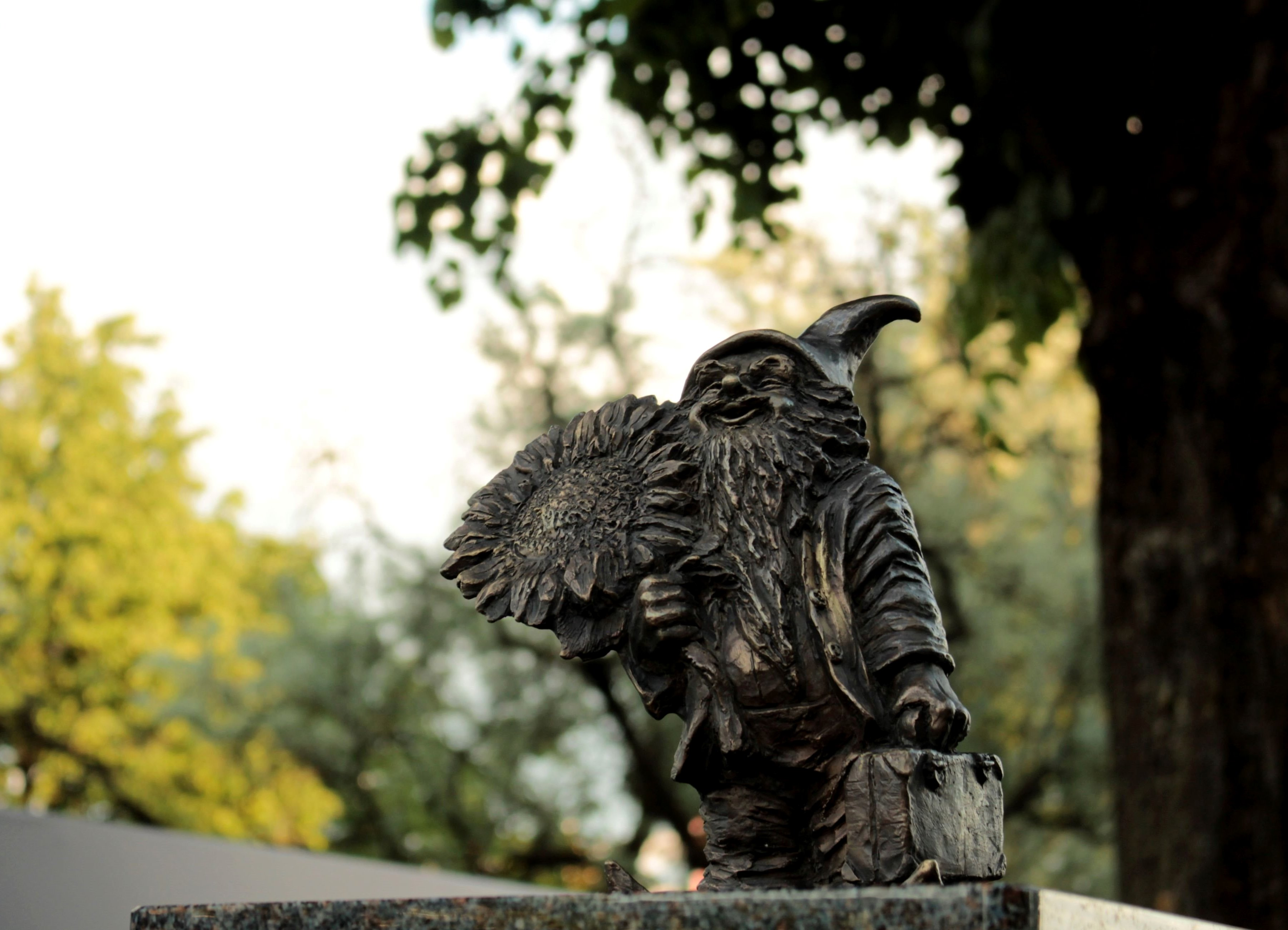 Kauno nykštukas